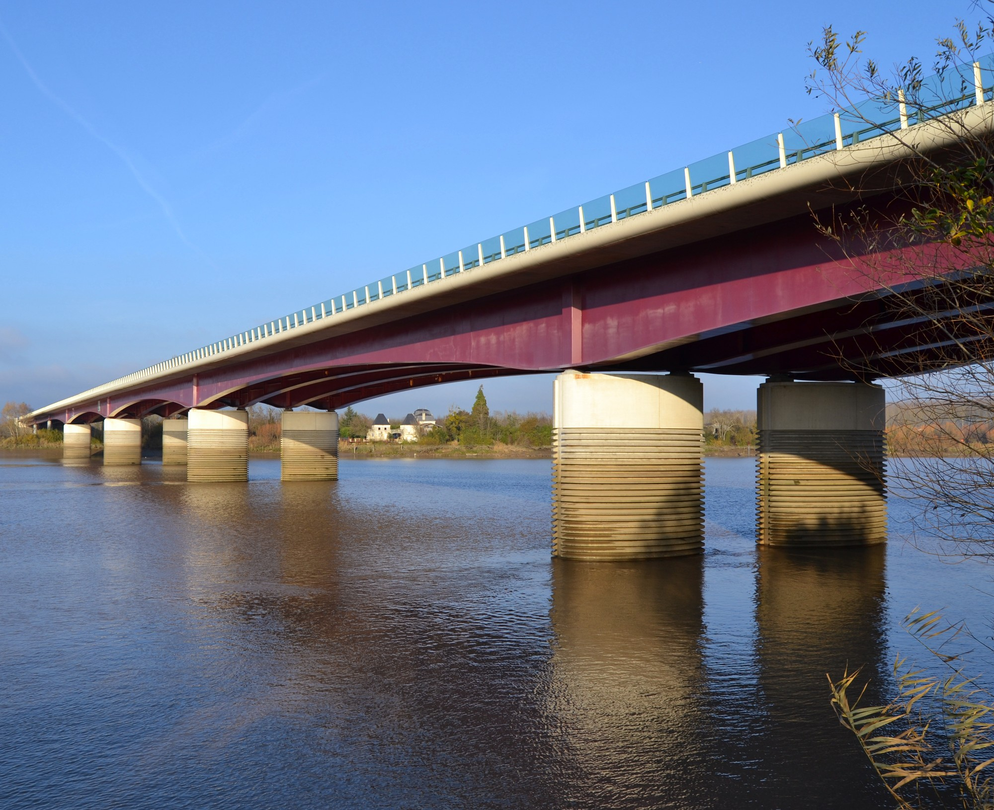 Le pont du Mascaret, Gironde, France